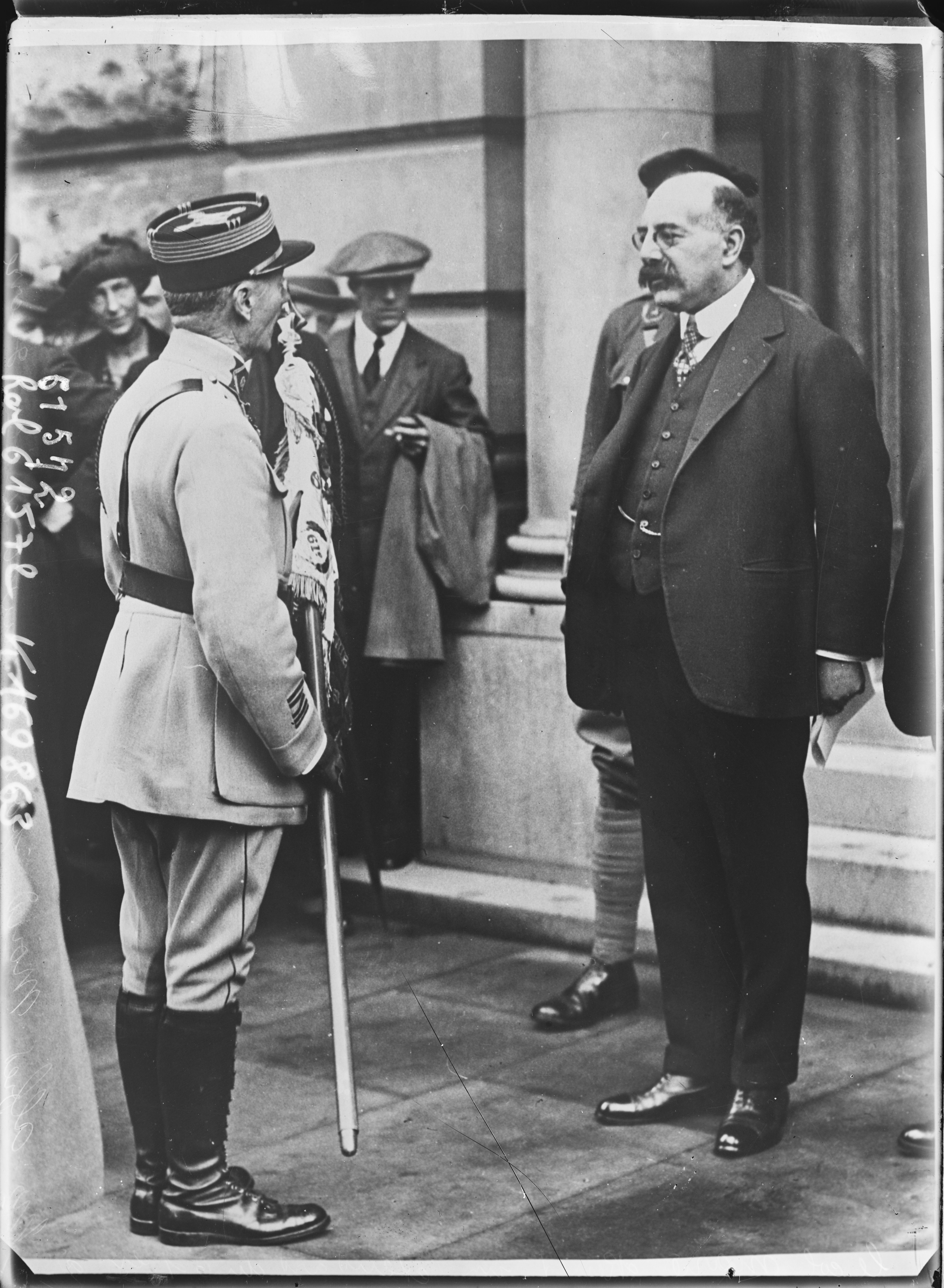 Le colonel Marie remet un étendard du 61e [régiment d'artillerie] à M. Alfred Mond pour le musée de la guerre [Imperial war museum, Londres] : [photographie de presse] / [Agence Rol] See also File:Imperial War Museum Galleries at the Crystal Palace, 1920 - 1924 Q31483.jpg and File:Imperial War Museum Galleries at the Crystal Palace, 1920 - 1924 Q31482.jpg